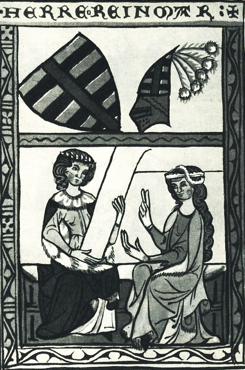 Abbildung des deutschen Minnesängers Reinmar der Alte in der Weingartner Liederhandschrift.